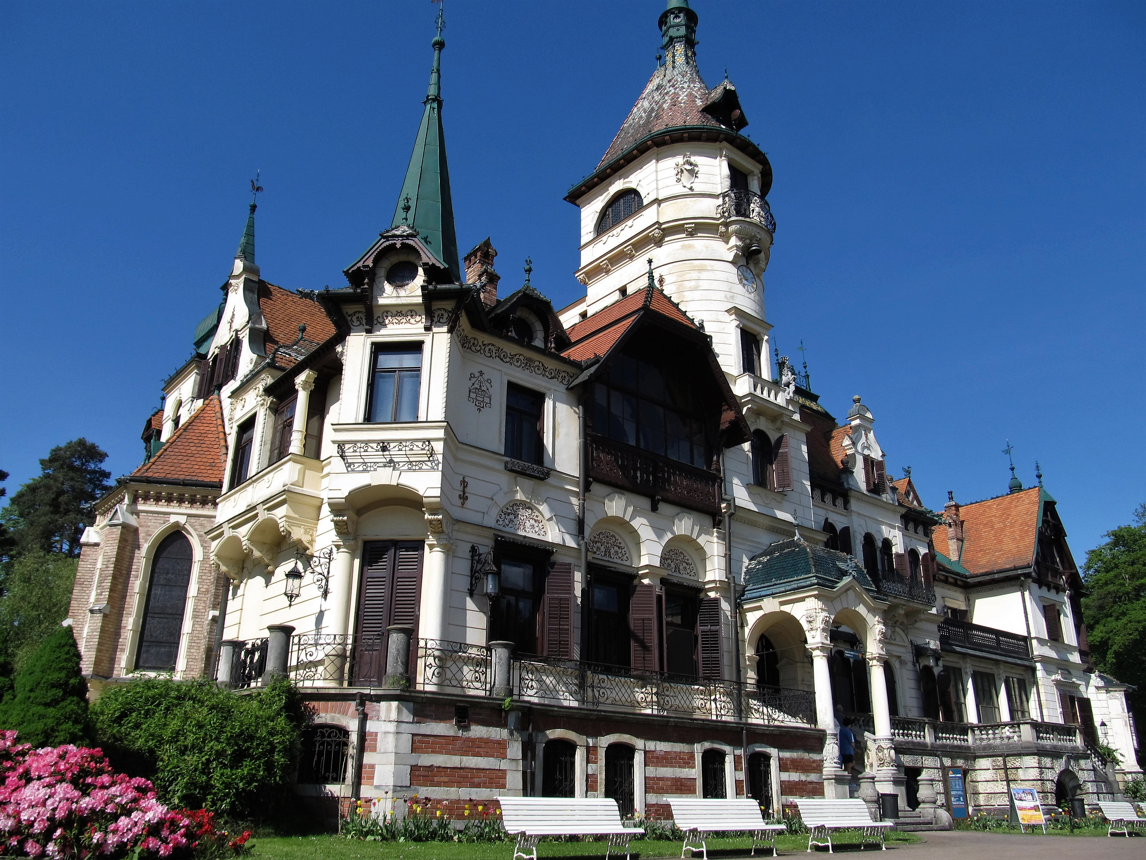 Zámek Lešná